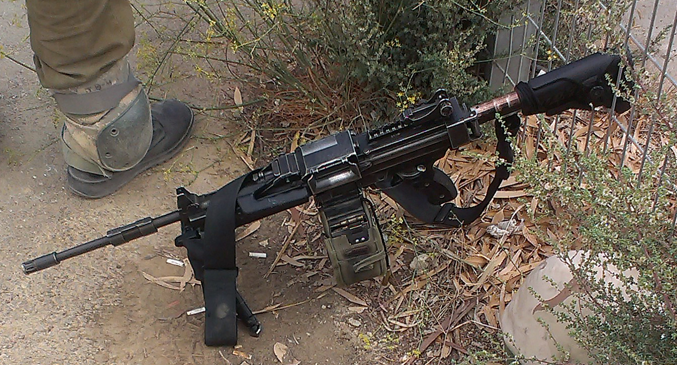 מקלע נגב NG7